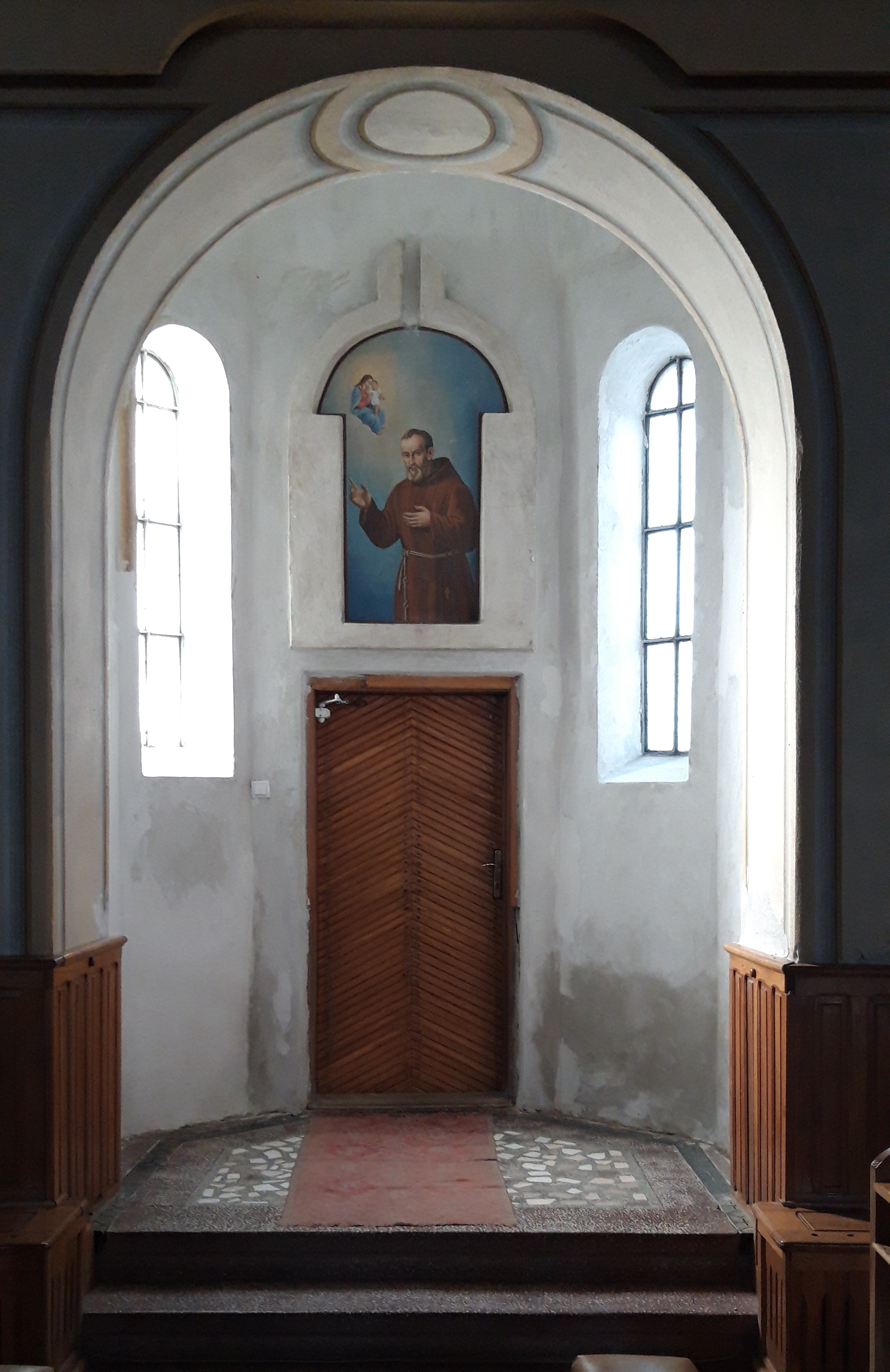 Reprezentare a lui Ieremia Valahul în biserica „Sfânta Ana” din Cireșoaia, Bacău.